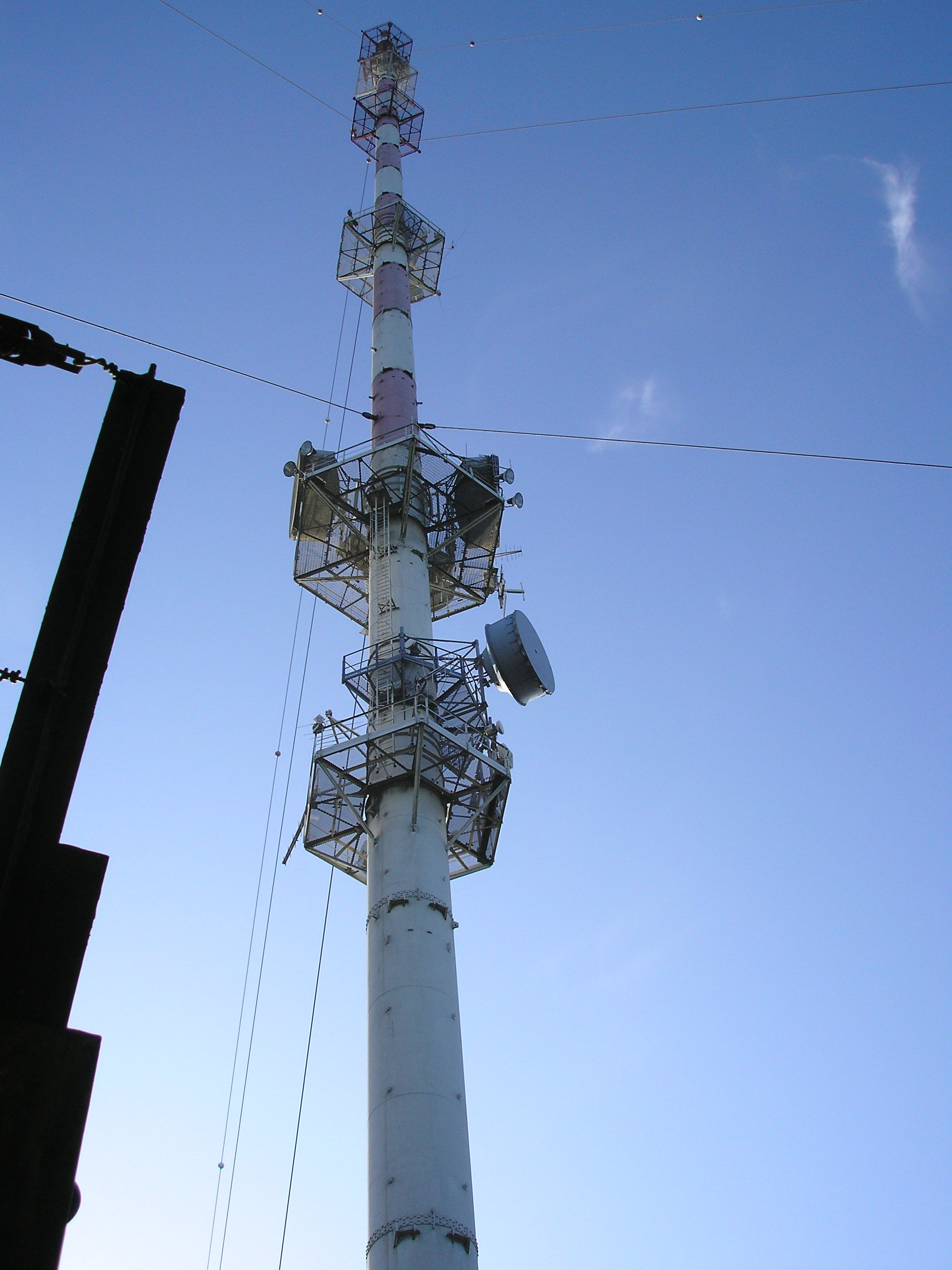 L'emetteur du Mont Rochard. Région: Pays de la Loire, Departement: Mayenne.